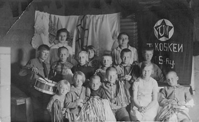 Työväen järjestönuorten liitto, Imatra